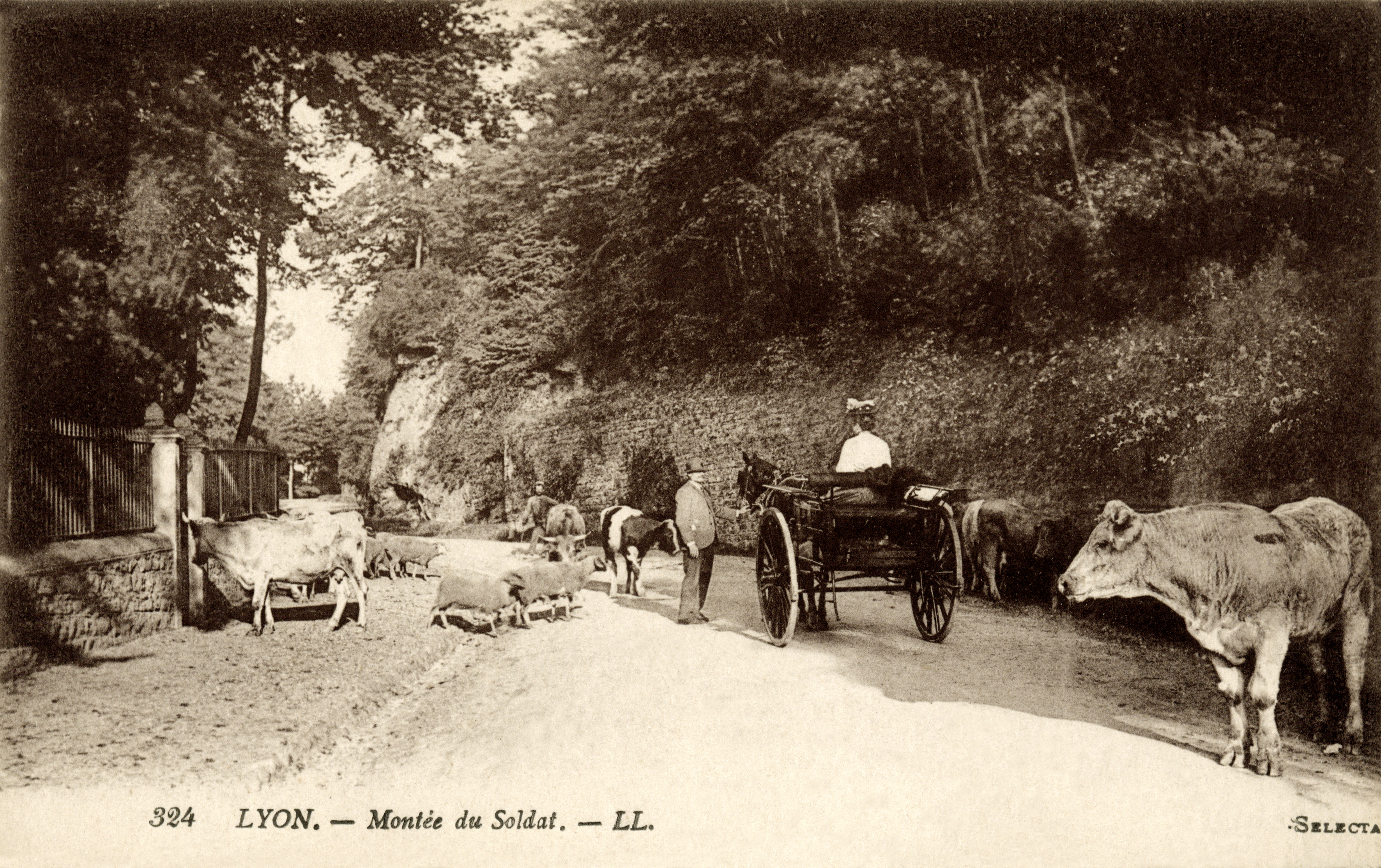 Montée Castellane (ex Montée du Soldat) à Caluire-et-Cuire en 1922.